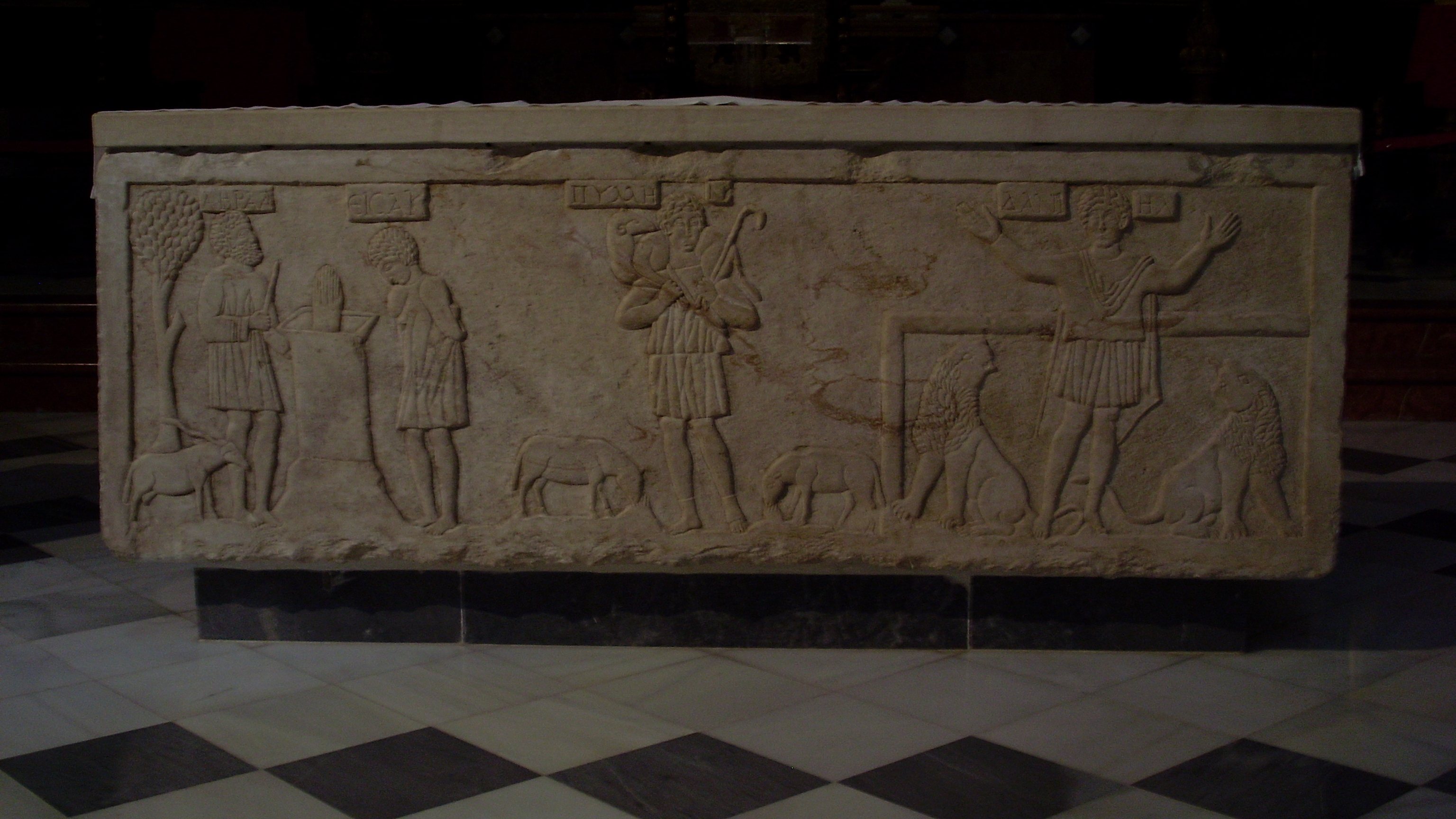 Sarcofago paleocristiano, de la Iglesia de Santa Cruz de Écija.